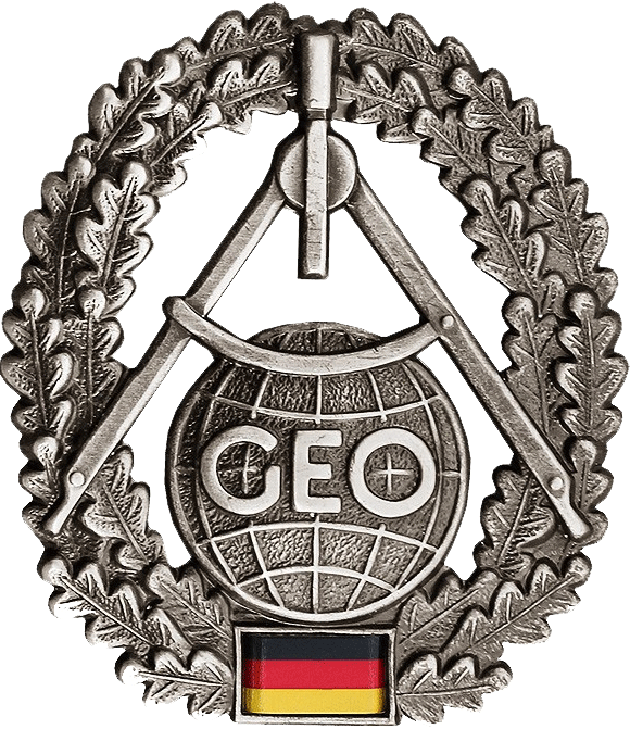 Barettabzeichen der Topographietruppe der Bundeswehr alternative Bezeichnung: Geoinformationsdienst / Militärgeografischer Dienst Barettfarbe: Korallenrot Maße: Hoch: 53mm Breit: 46mm Ausführung: altsilber, Metall